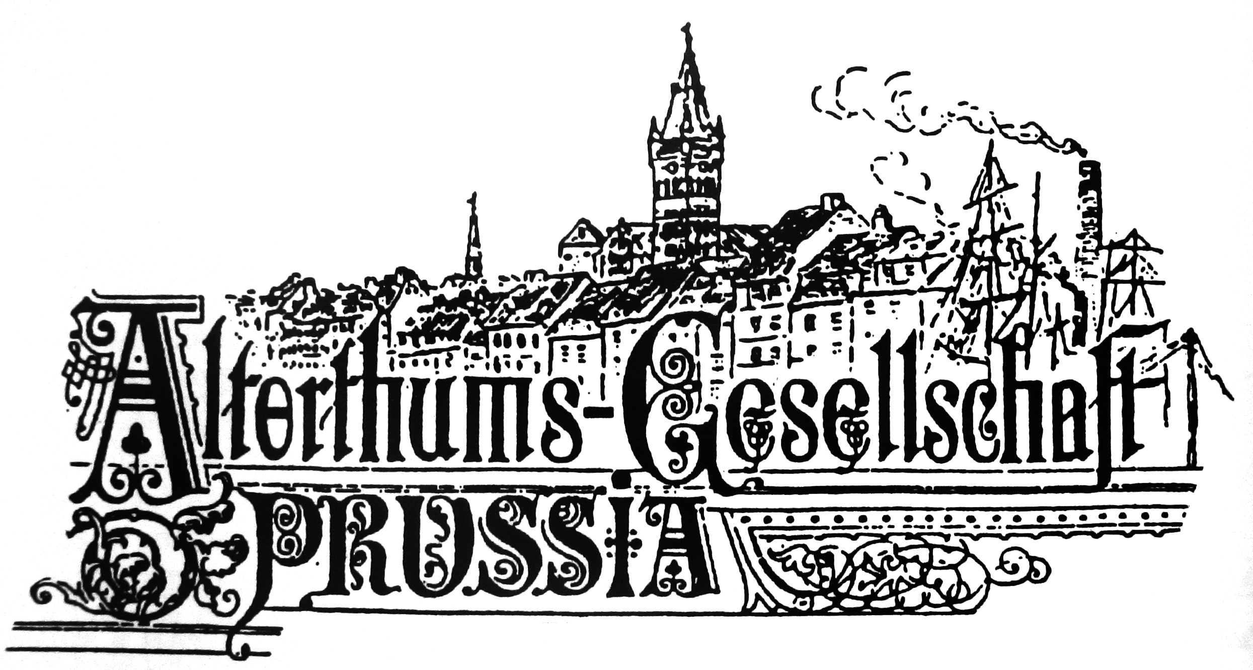 Altertums-Gesellschaft Prussia Logo (Zeichen)